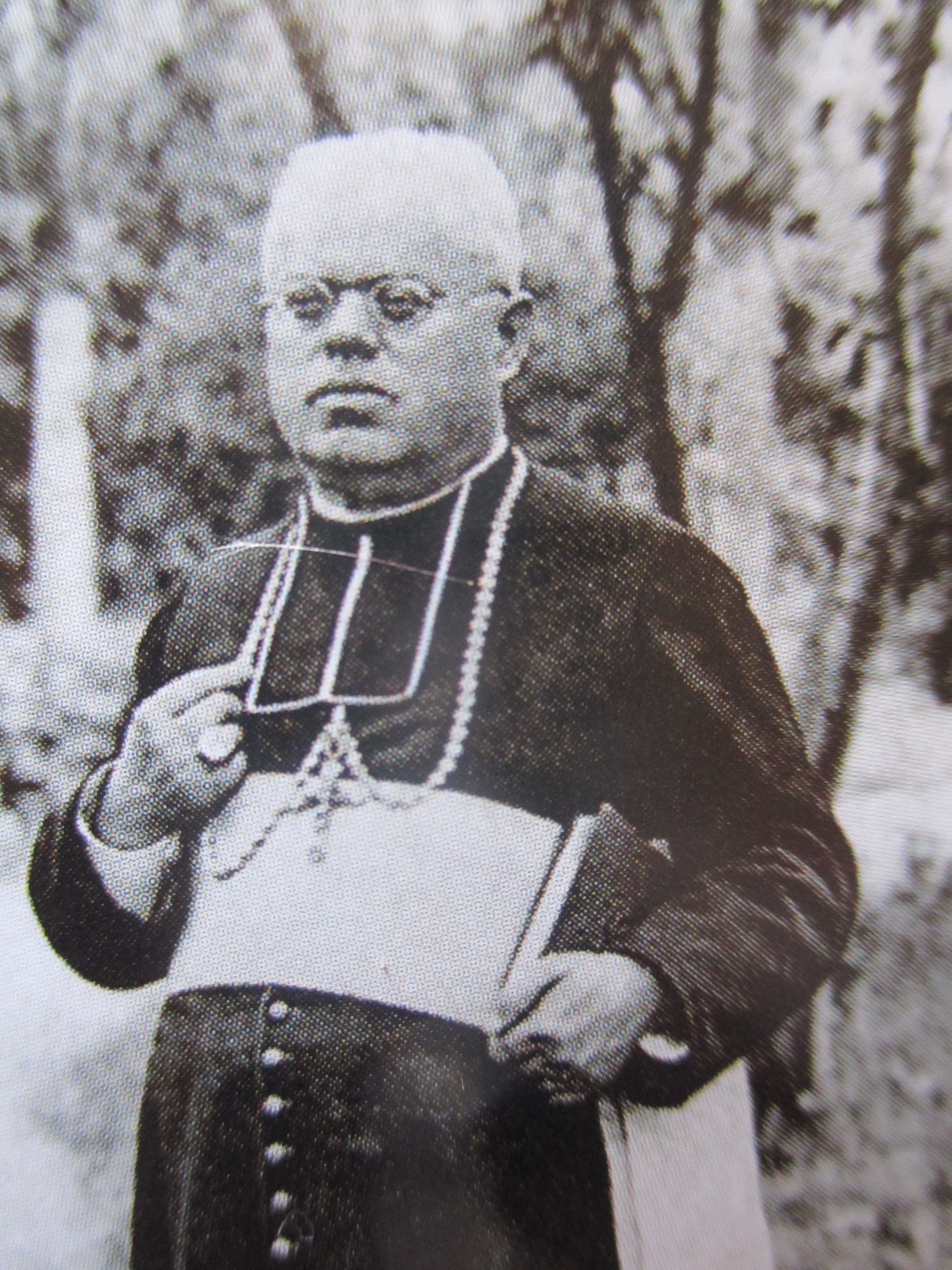 Photographie de Mgr Lacroix.